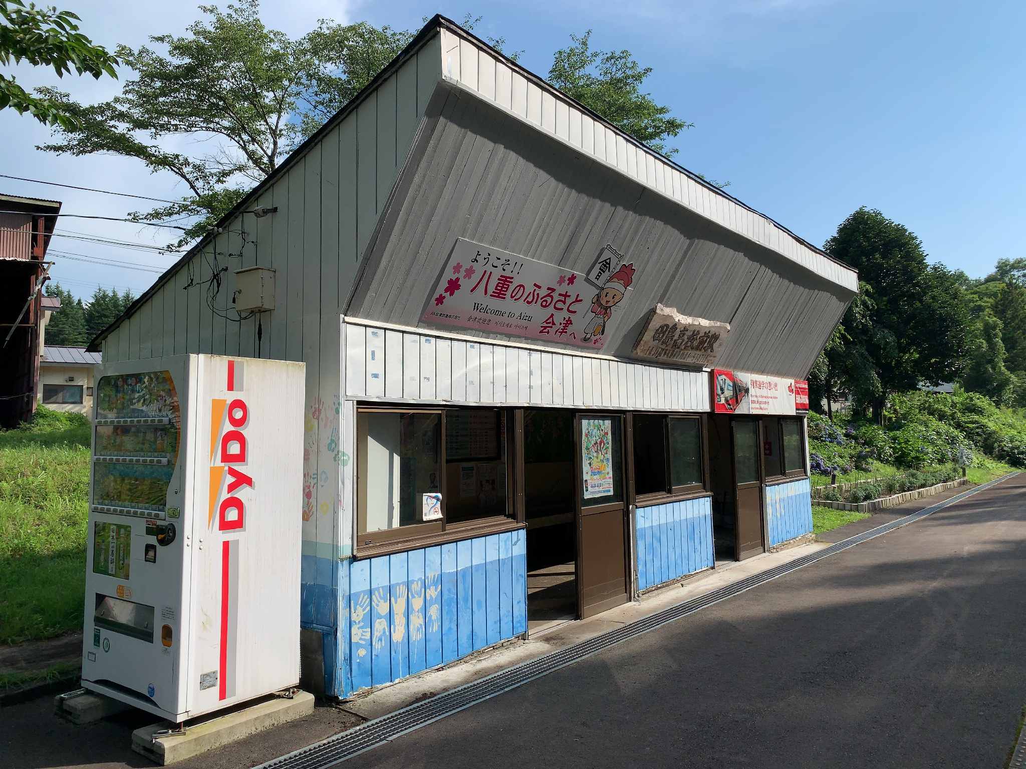 会津鉄道 田島高校前駅 駅舎